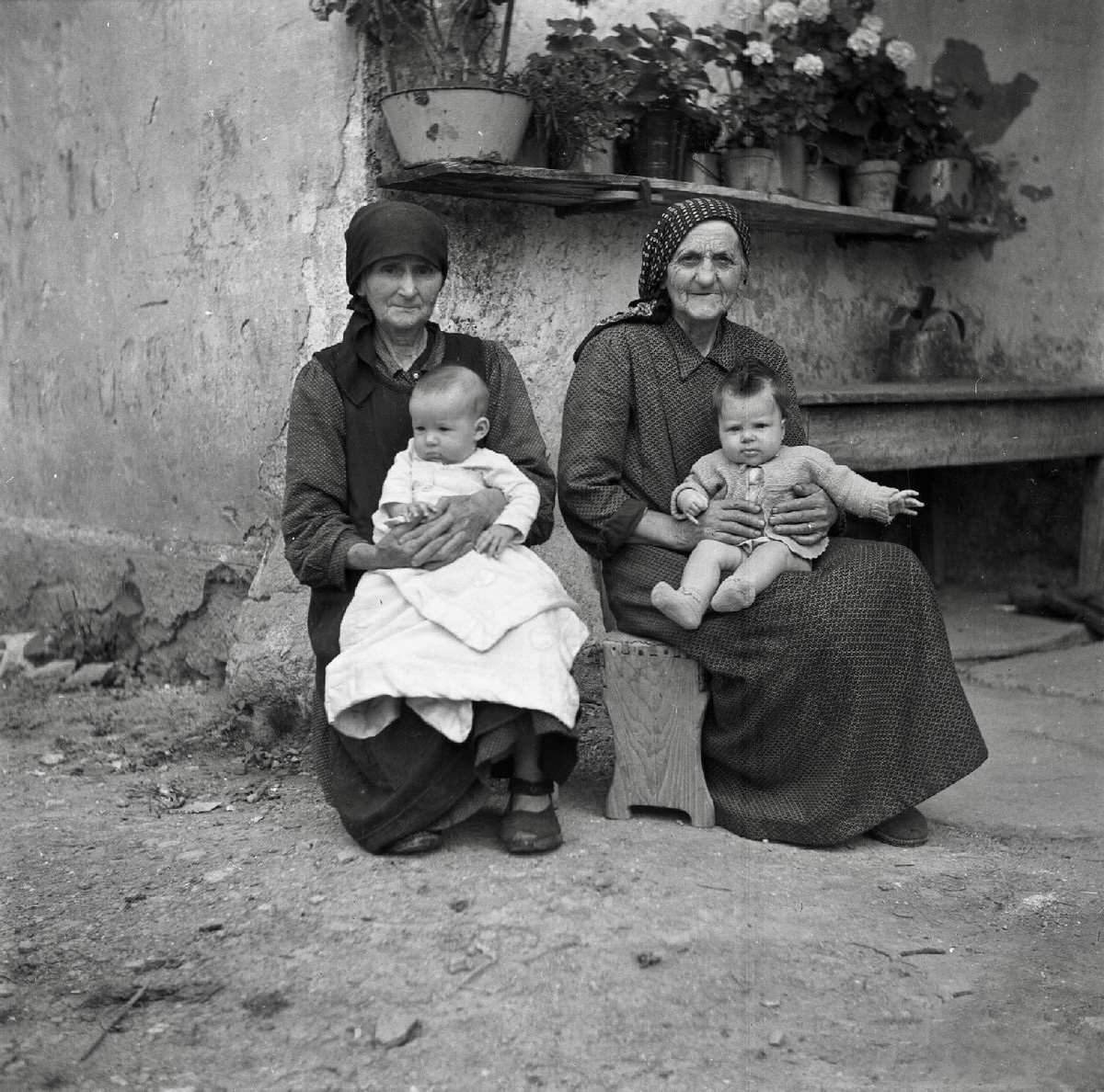 Dve noni z otrokoma v naročju, Markovščina.